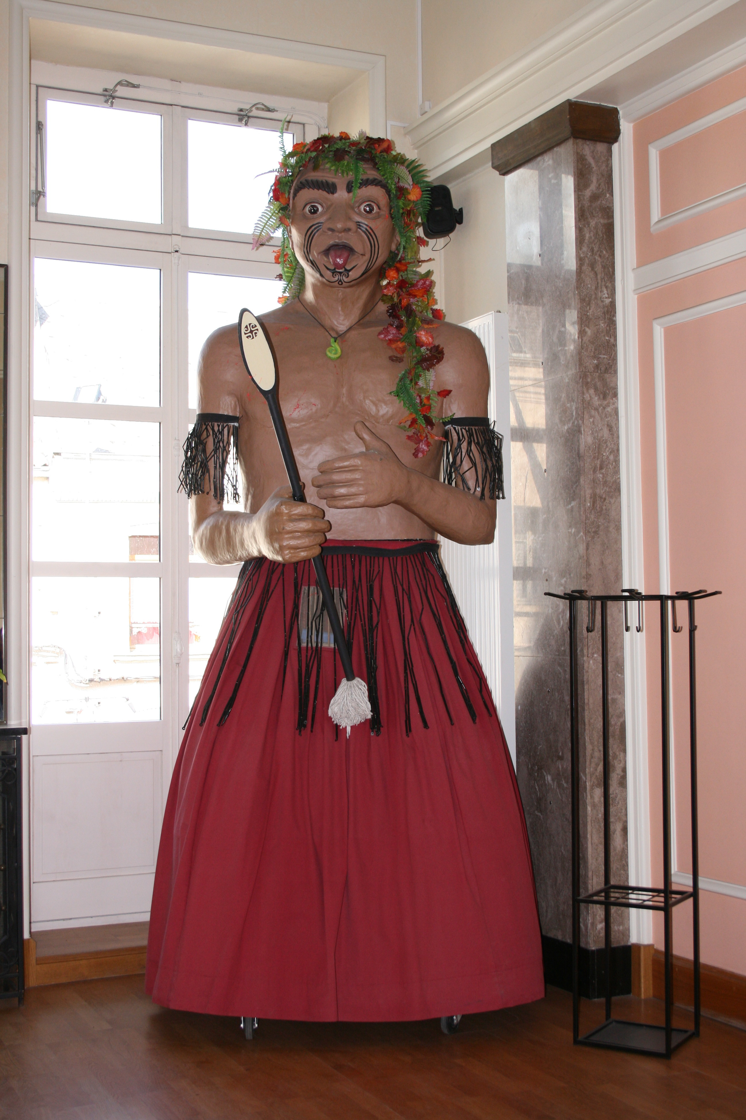 Le Quesnoy, département du Nord (France). Un des deux géants de la ville, Maori, créé en 2004, conservé au premier étage de l'Hôtel de Ville